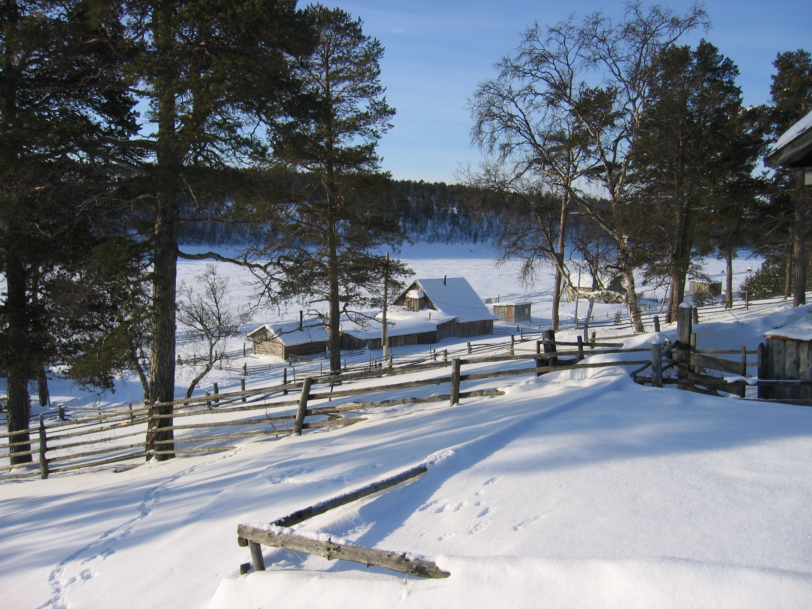 Село Каневка